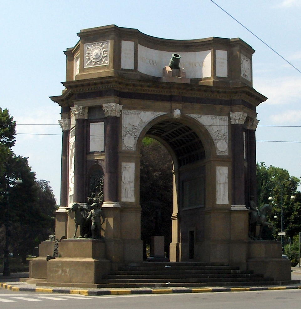 L'arco del Valentino di Torino. Arco monumentale dedicato all'Arma di Artiglieria, situato all'ingresso del Valentino. Opera dello scultore Pietro Canonica.